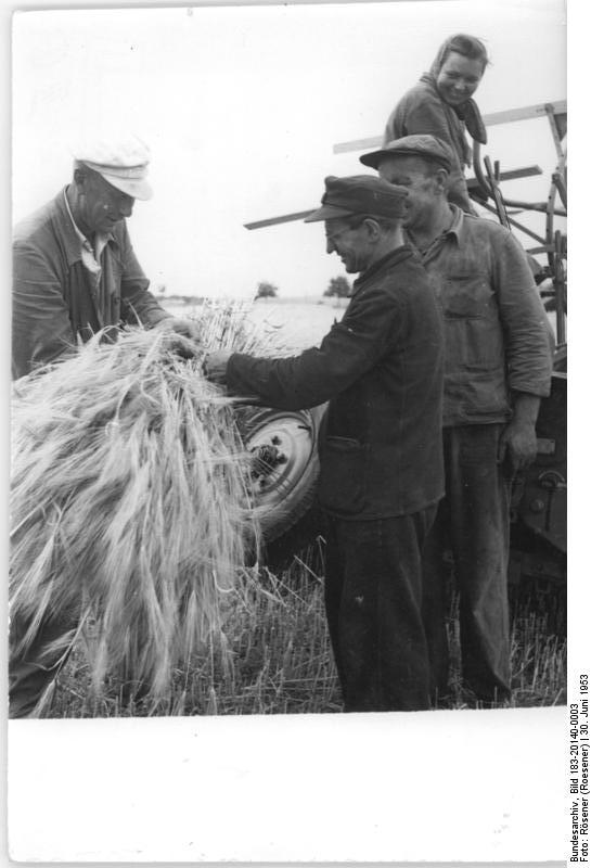 Welsleben, Getreideernte mit Mähbinder Zentralbild Rösener 30.6.1953 Ernte 1953 in der Deutschen Demokratischen Republik Mit der Wintergerstenmahd begann die Brigade 4 der MTS Schönebeck - Aussenstelle Welsleben. UBz: Die Gerste auf dem Feld von Bauer Hein (links) aus Frohse wird von den Traktoristen mit dem neuen S-Fuß-Zapfwellenbinder Typ 53 aus Zella-Mehlis geerntet.